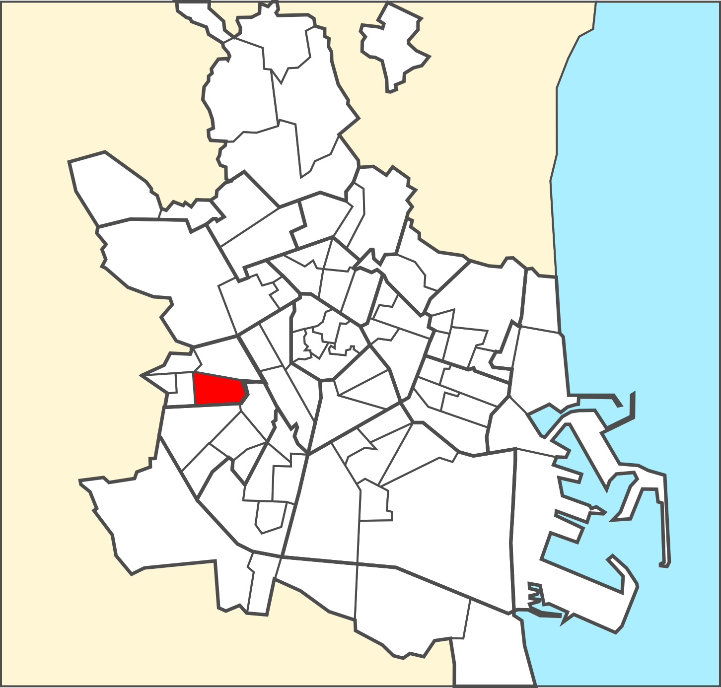 Localització del barri dins de la ciutat de València.